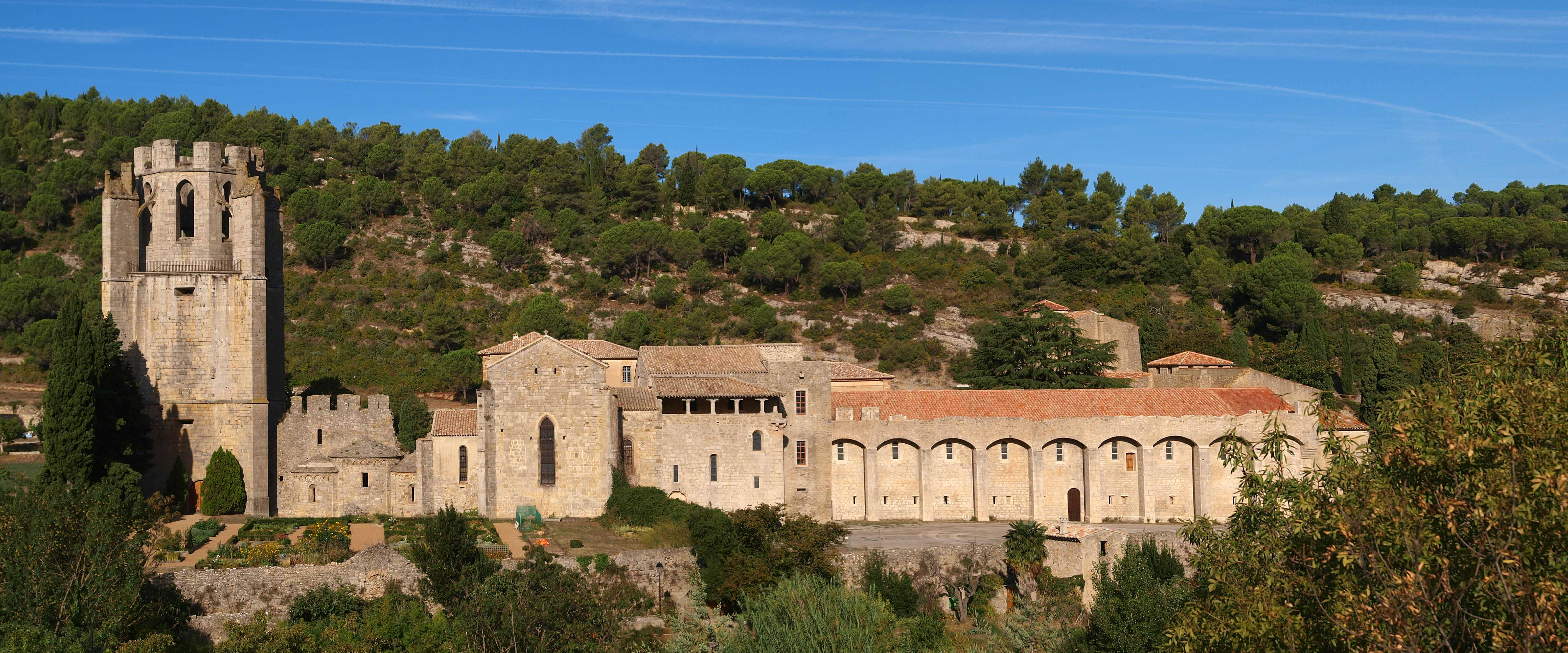 Abbaye Sainte-Marie de Lagrasse vue depuis le village